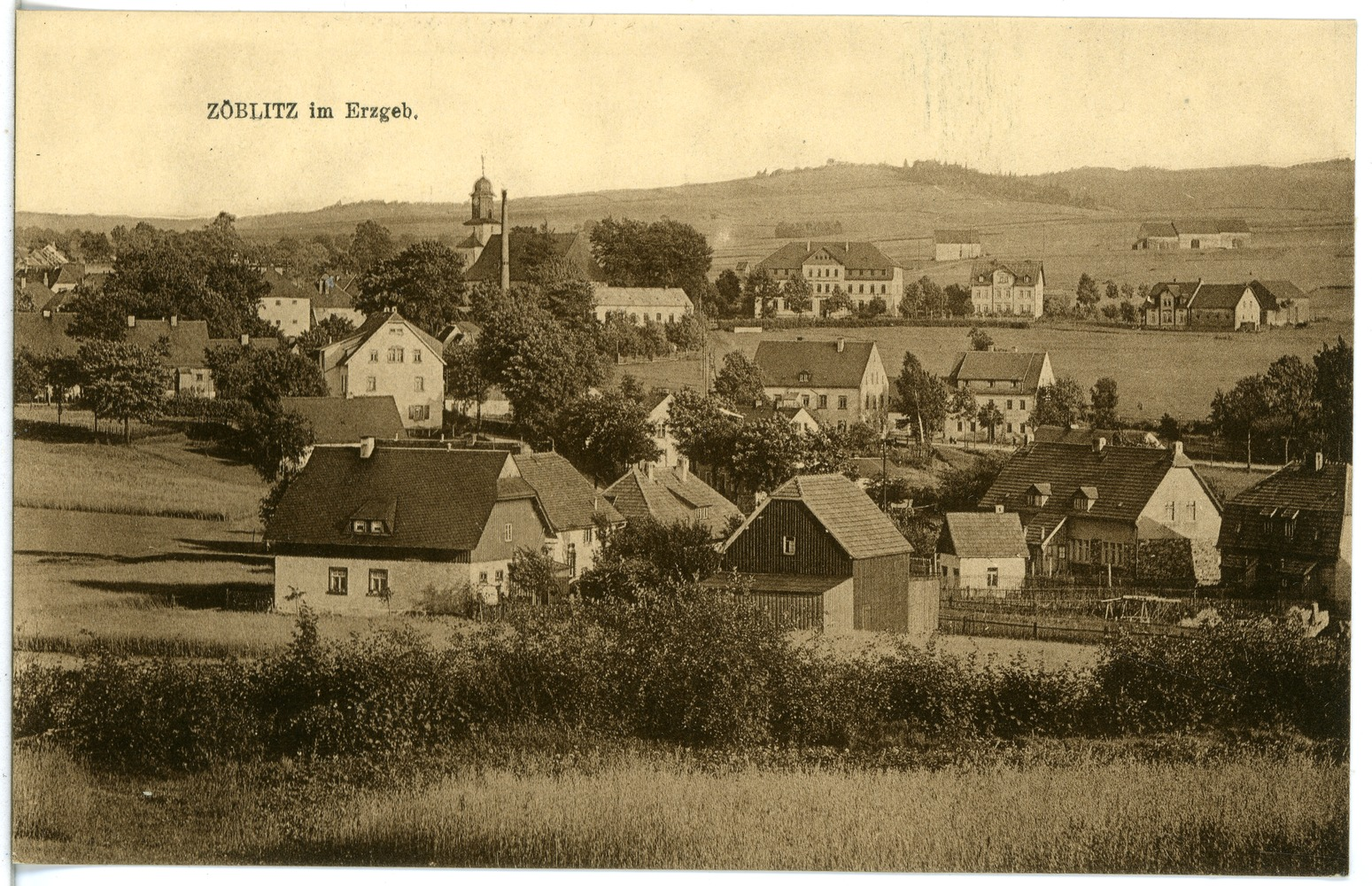 Zöblitz; Blick auf Zöblitz This postcard is from publisher Brück & Sohn in Meißen ( postcard has a unique number 21095 and is available in a higher resolution at the publisher. This images was uploaded in a cooperation project between Wikipedians and the publisher.